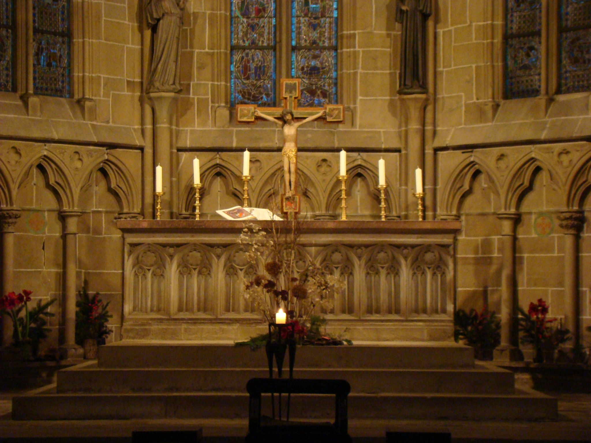 Hauptaltar der Stiftskirche St. Peter in Bad Wimpfen